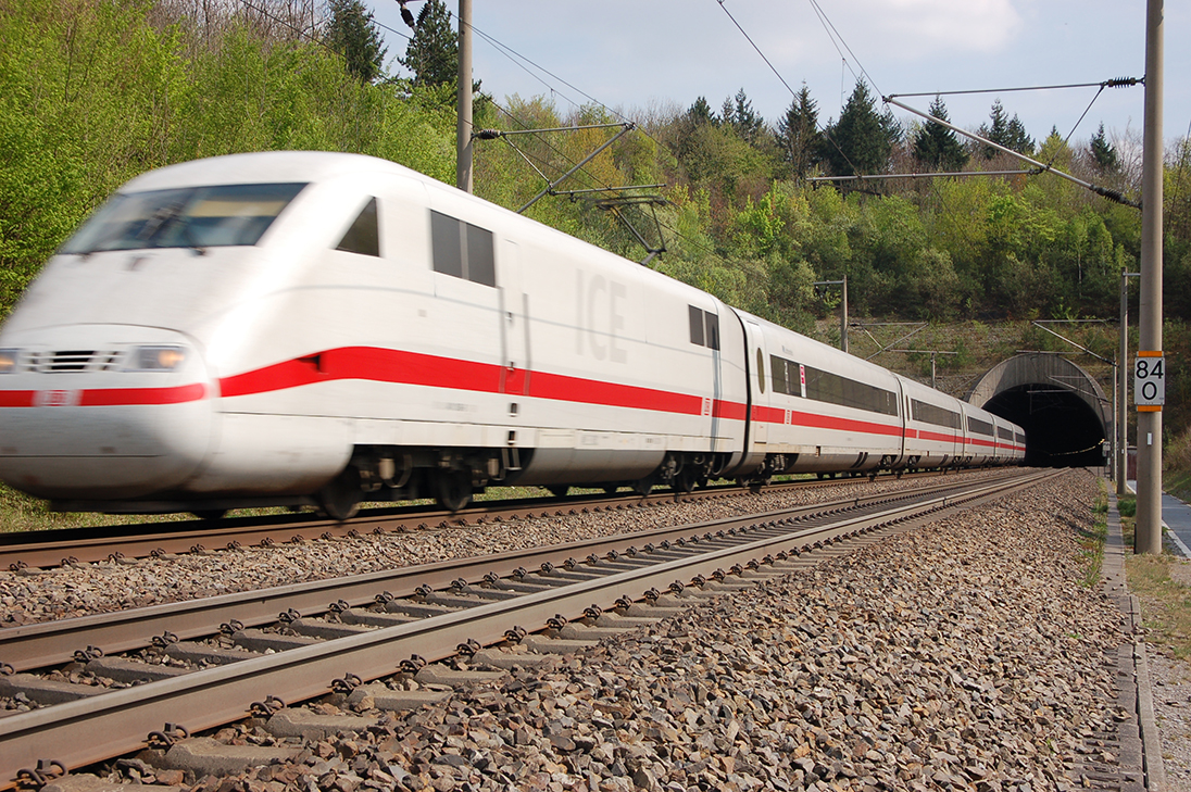 Schnellbahntrasse unter dem Burgstall der Dauseck (Pulverdinger Tunnel)